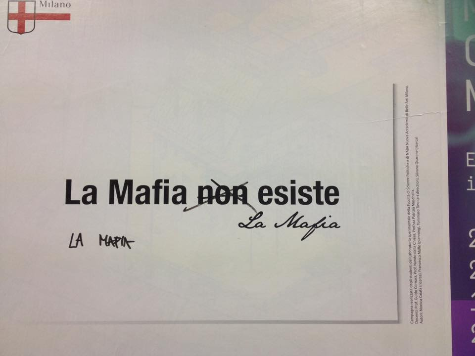 Il manifesto simbolo della campagna 2012 del Festival dei beni confiscati alle Mafie